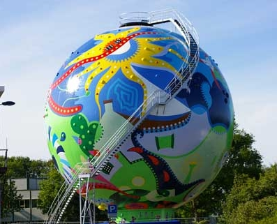 Kunstwerk de Stip